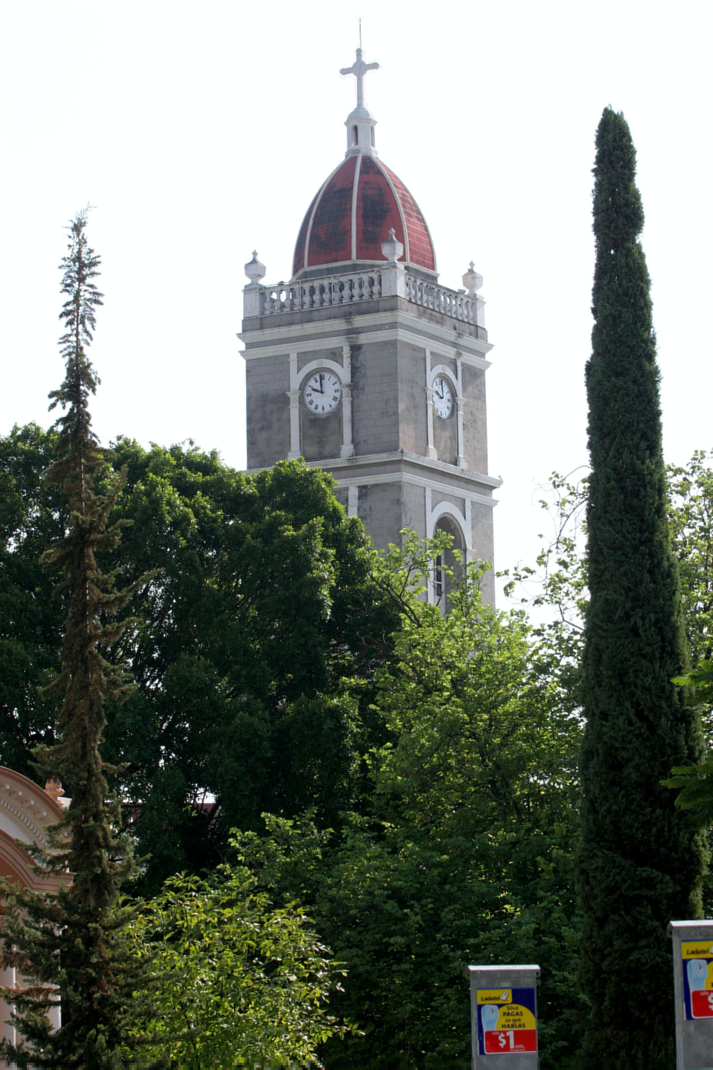 Torre de las Catedral de Nuestra Señora del Refugio, Ciudad Victoria, Tamaulipas, México.